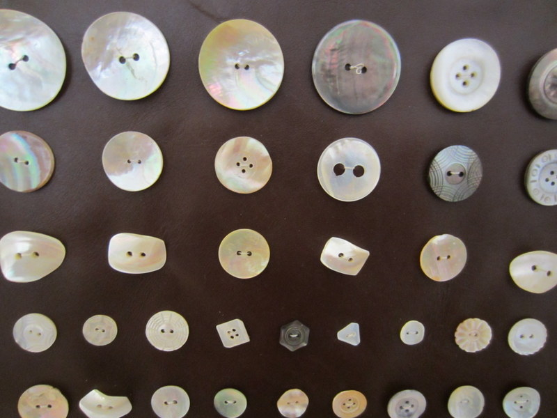 Knoflíky vyráběné z mušlí